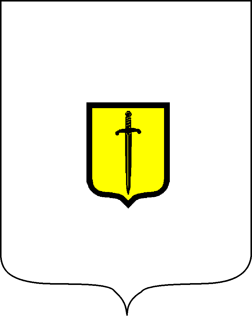 blason de comtesse, veuve de millitaire